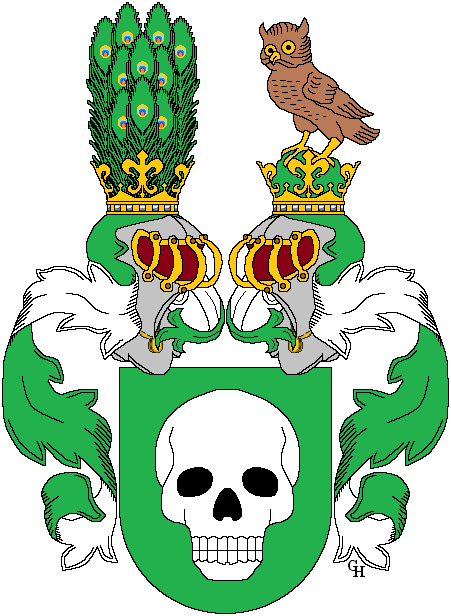 Wappen des Professors der Anatomie an der Universität Innsbruck, Dr. Karl Dantscher (1813–1887), verliehen anlässlich seiner Erhebung in den österreichischen Ritterstand mit dem Prädikat "von Kollesberg" 1876. Zeichnung von Gerd Hruška ( Für weitere Informationen zu dieser Standeserhebung siehe (